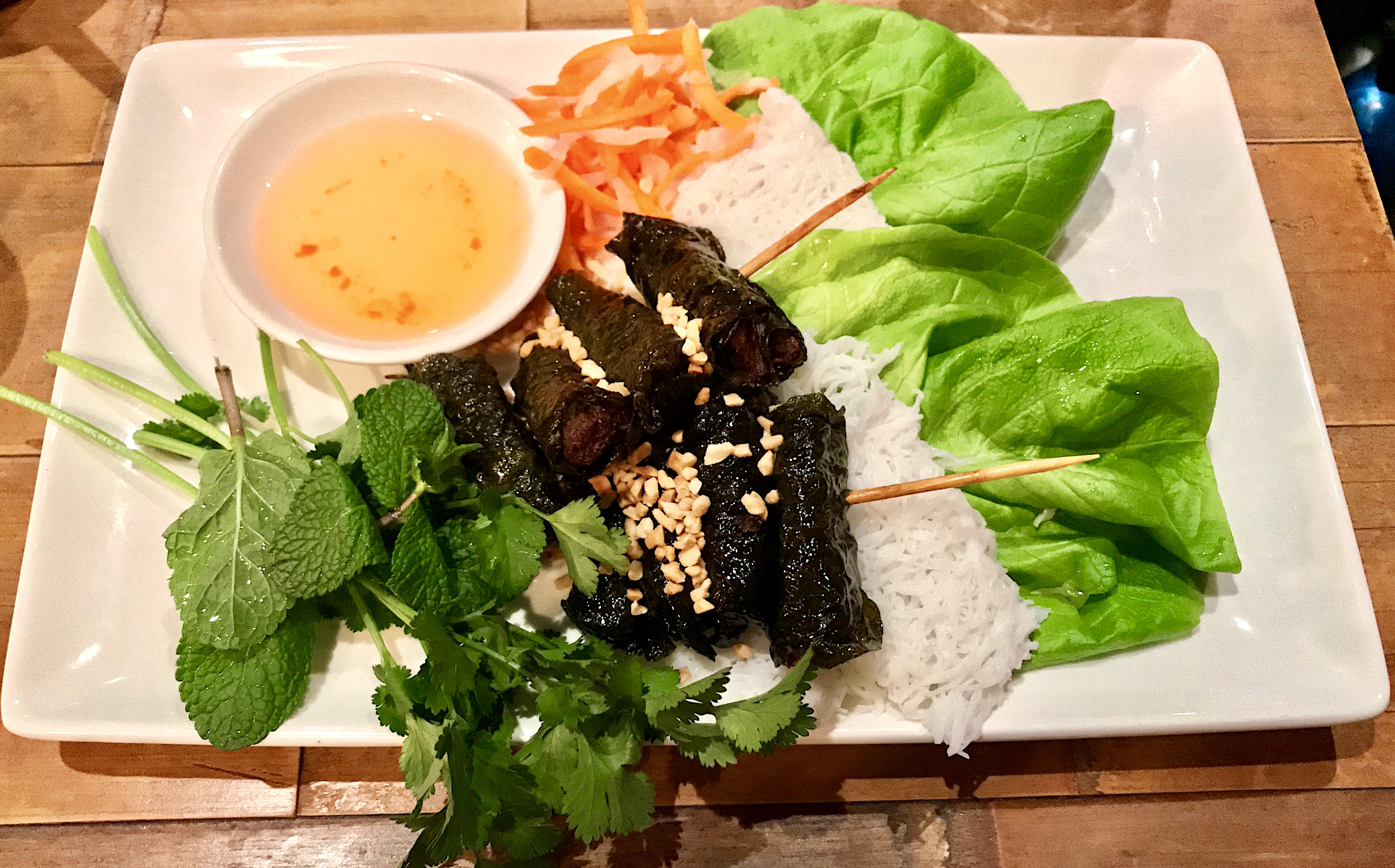 Bò nướng lá lốt tại quán Pho Manchester